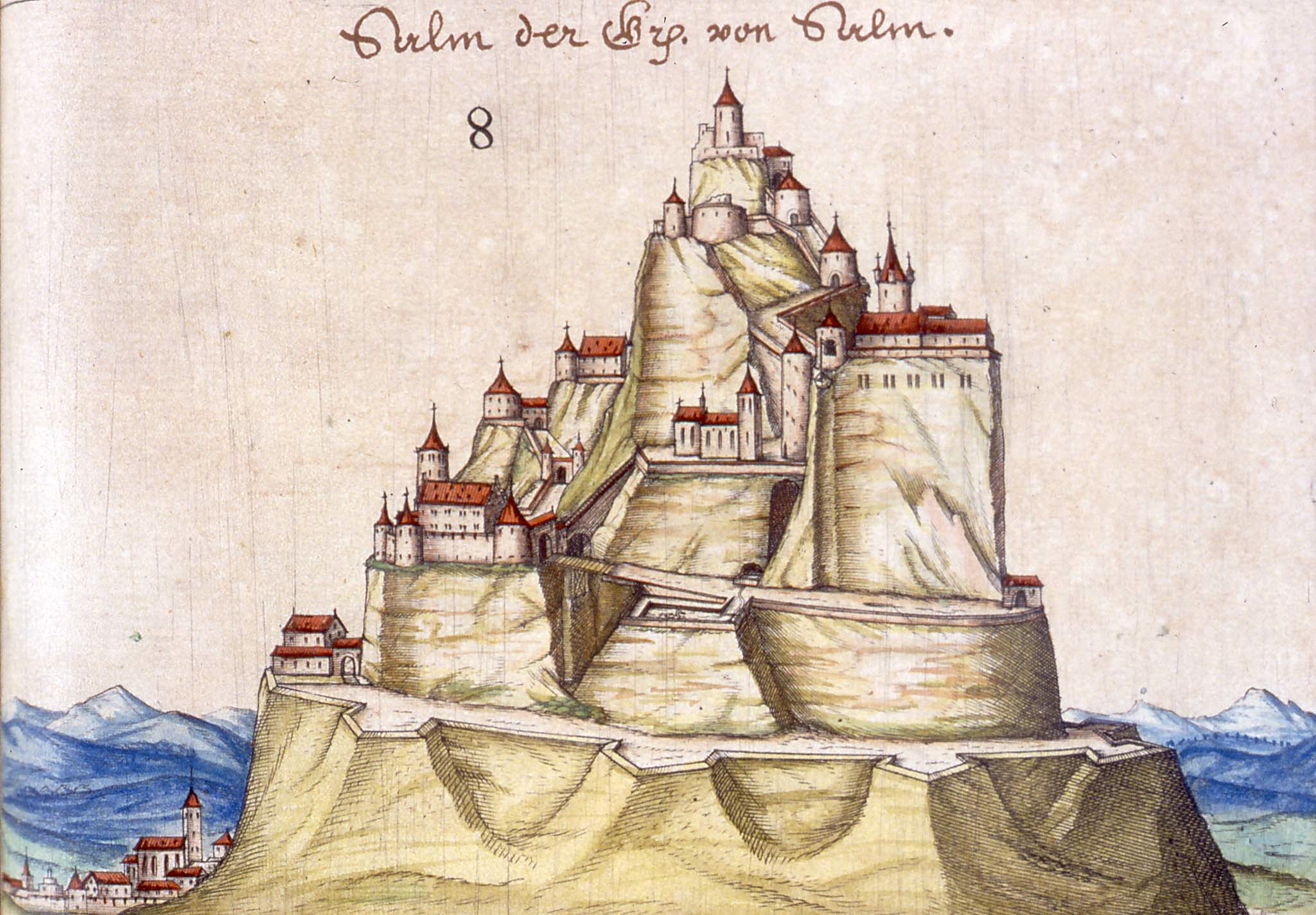 Croquis du château de Salm en 1589.